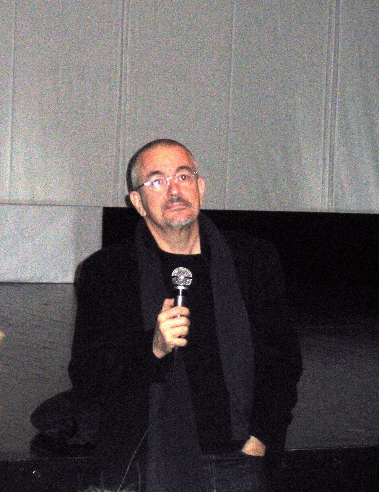 Jean-Jacques Beineix, à Amiens (France) - Le réalisateur est à la "Maison de la Culture" lors du « 26ème Festival international du film d'Amiens » pour un entretien avec le public à l'occasion de la sortie de son ouvrage.